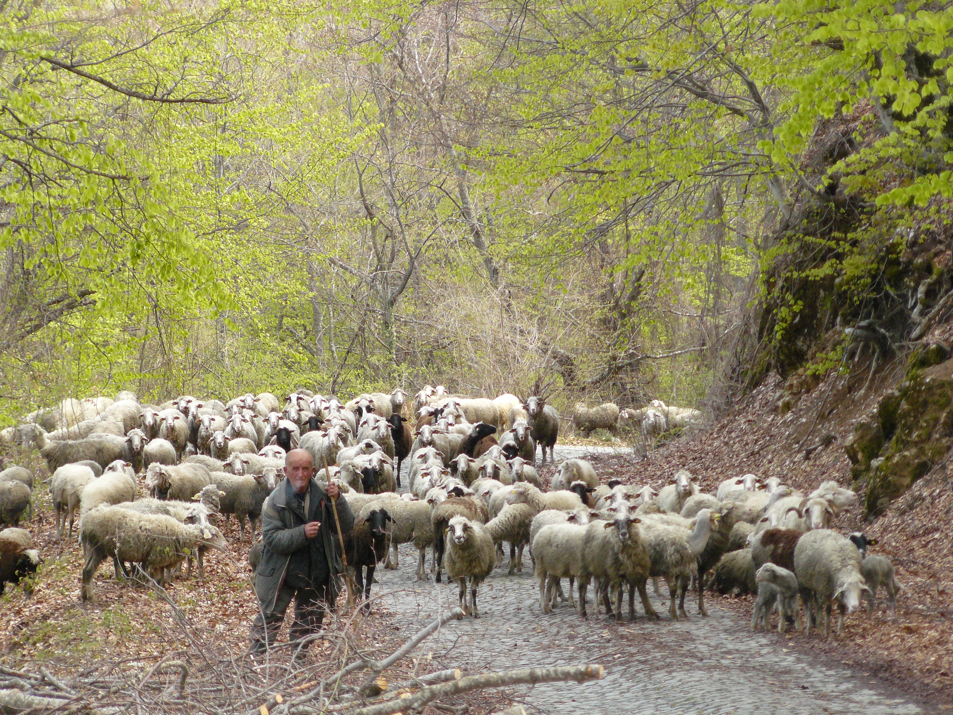 Овчар, стадо овци